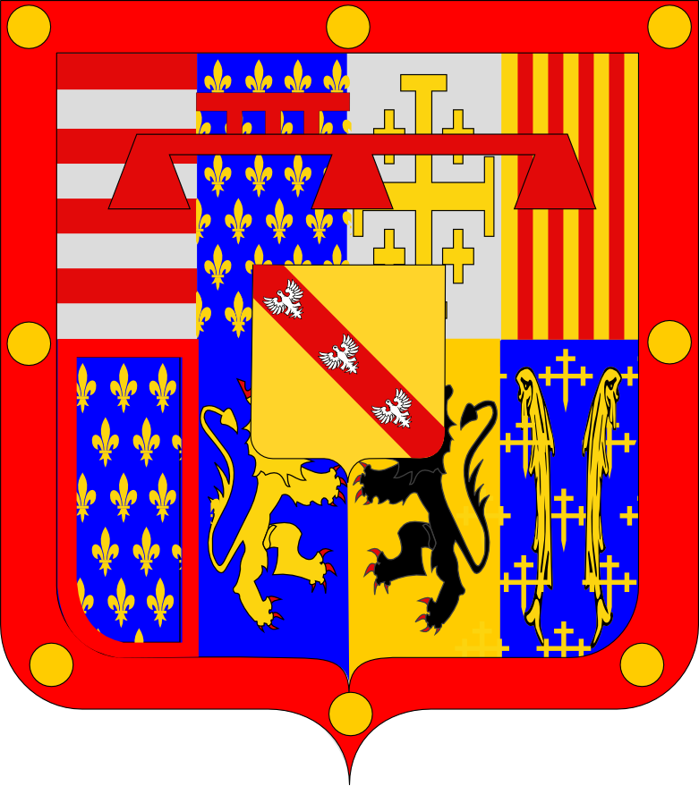 Das ist das Wappen der Familie von Karl von Lothringen-Commercy. Es handelt sich im das Wappen der Herzöge von Guise mit rotem Bord, belegt mit 8 golden Kugeln.